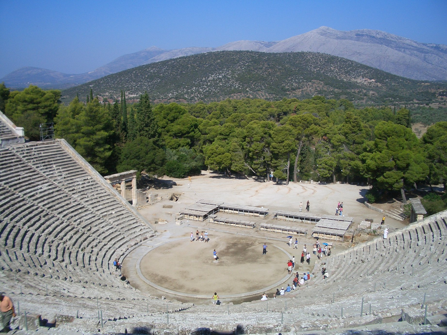 Großes Theater in Epidauros.